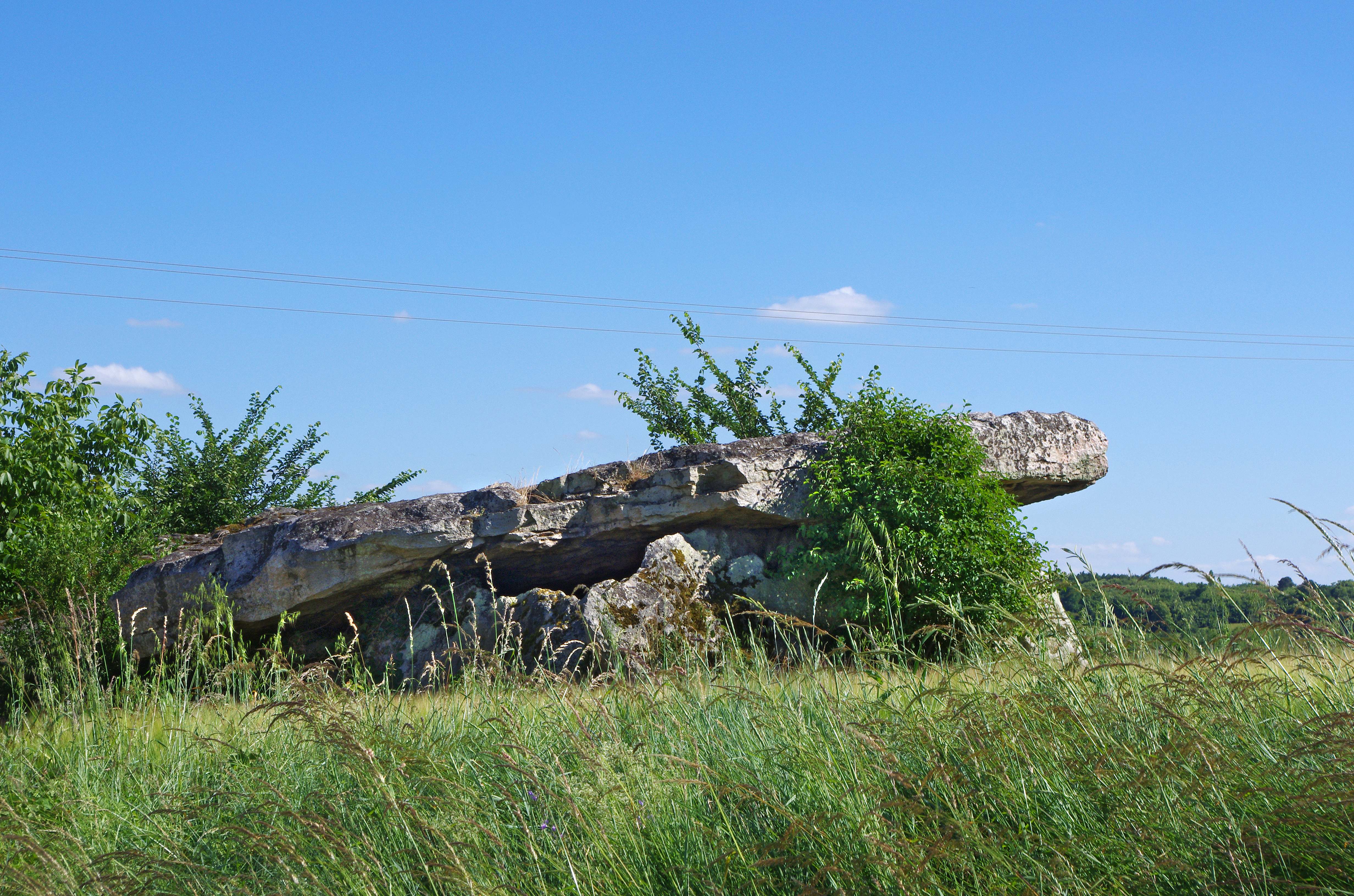 Gennes (Maine-et-Loire) Dolmen de la Pagerie ou Pierre Couverte de la Pagerie. La chambre mesure 10,65 m de long et 5 m de large intérieur, précédé d'un portique. Une dalle de fond, deux supports latéraux sud, un seul côté nord. Deux dalles de couverture. La dalle antérieure repose à terre du côté nord. De ce côté, la dalle mesure 1,20 m d'épaisseur. Ce dolmen à portique rétréci est fait en grès à vermiculures. D'après un plan de M. Léon de Lorière, au Musée St Jean d'Angers, un lusus naturae* simule une tête de bovidé sur laquelle un oeil aurait été rapporté. Fouillé en 1897, par MM d'Achon et de Farcy, un squelette avait été découvert, placé à 6 m du fond, les pieds vers l'entrée. Plus récemment, ce sont des débris de brique romaine et des éclats de silex blond qui ont été trouvés par Michel Gruet (1912-1998). Il y a un siècle se voyaient encore à l'arrière les restes du tumulus, totalement disparus depuis, à cause des travaux agricoles. lusus naturae : "caprice de la nature". Gennes Maine-et-Loire France Gennes (Maine-et-Loire) Dolmen de la Pierre-Couverte or Pagerie. The room is 10.65 m long and 5 m wide inside, preceded by a portico. A slab of bottom, two lateral supports south side, one north side. Two cover slabs. The anterior slab rests on the ground on the north side. On this side, the slab measuring 1.20 m thick. This dolmen has shrunk portico is made of sandstone has vermiculations. According to a plan Mr. Leon Lorière at St Jean d'Angers Museum, lusus naturae* simulates a bovine head on which an eye wasn reported. Excavation in 1897 by MM Achon and Farcy, a skeleton had been discovered, placed at 6 m from the bottom, feet toward the entrance. More recently, they are debris of Roman brick and flint flakes blond who have been found by Michel Gruet (1912-1998). There is a century saw still in the back of the tumulus remains totally disappeared since, due to agricultural work. lusus naturae "freak of nature".